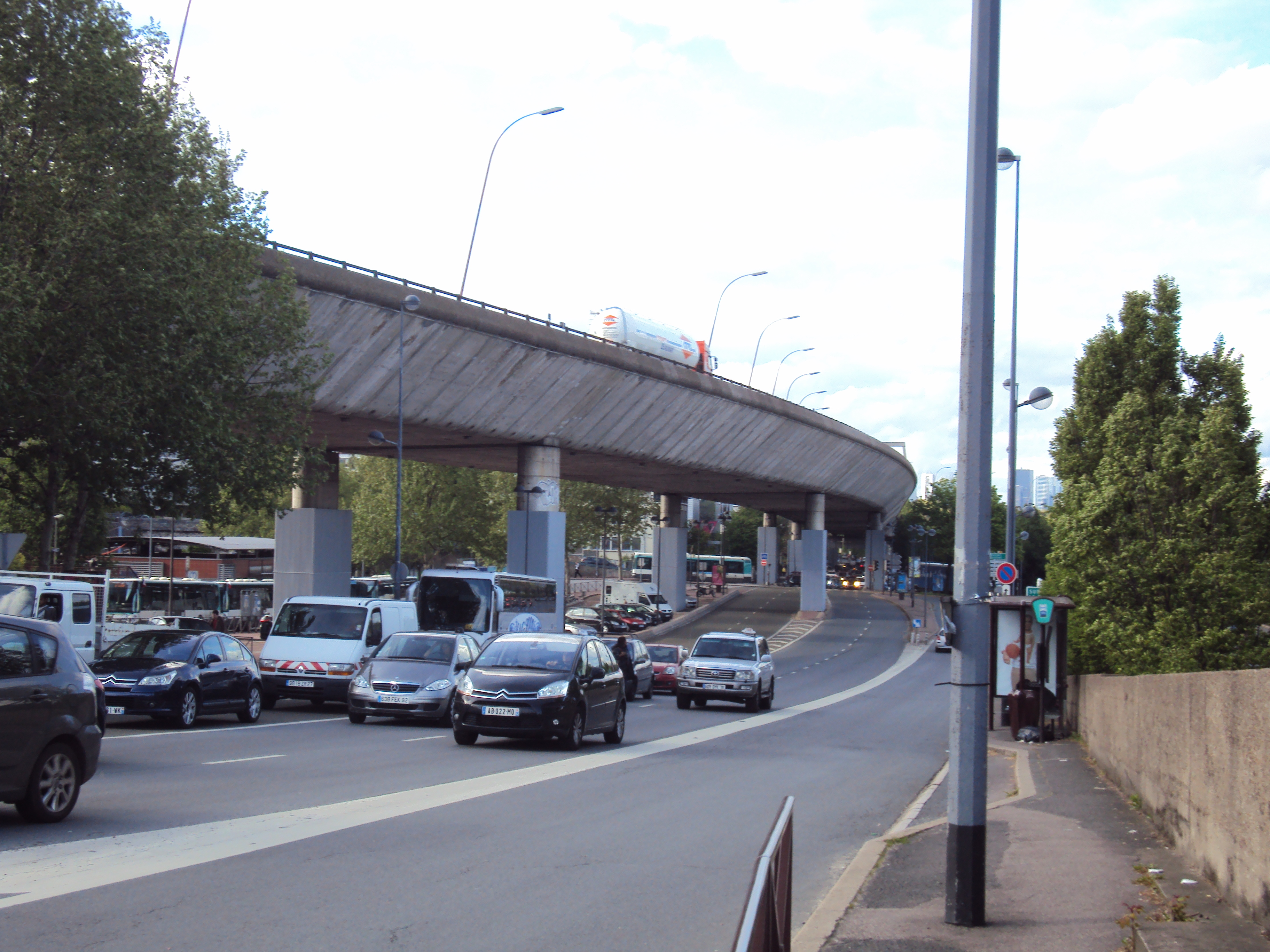 Viaduc A13 de Saint-Cloud pres de la station de T2 pont de Saint-Cloud